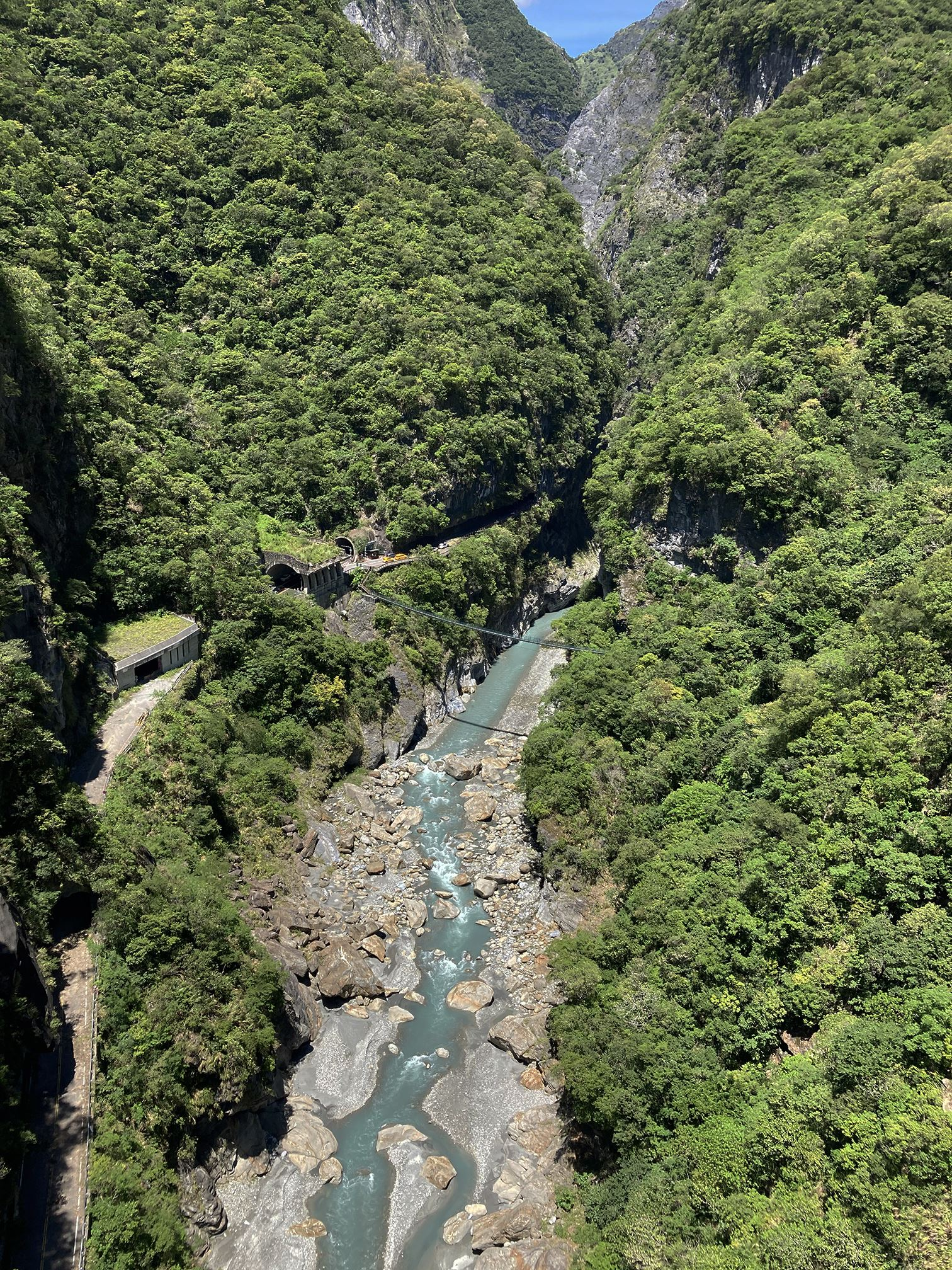 中文（台灣）: 由山月吊橋上眺望錐麓吊橋與燕子口